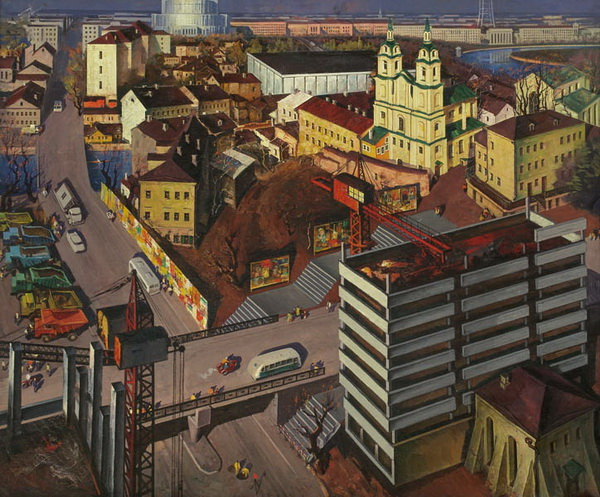 Холст, масло.